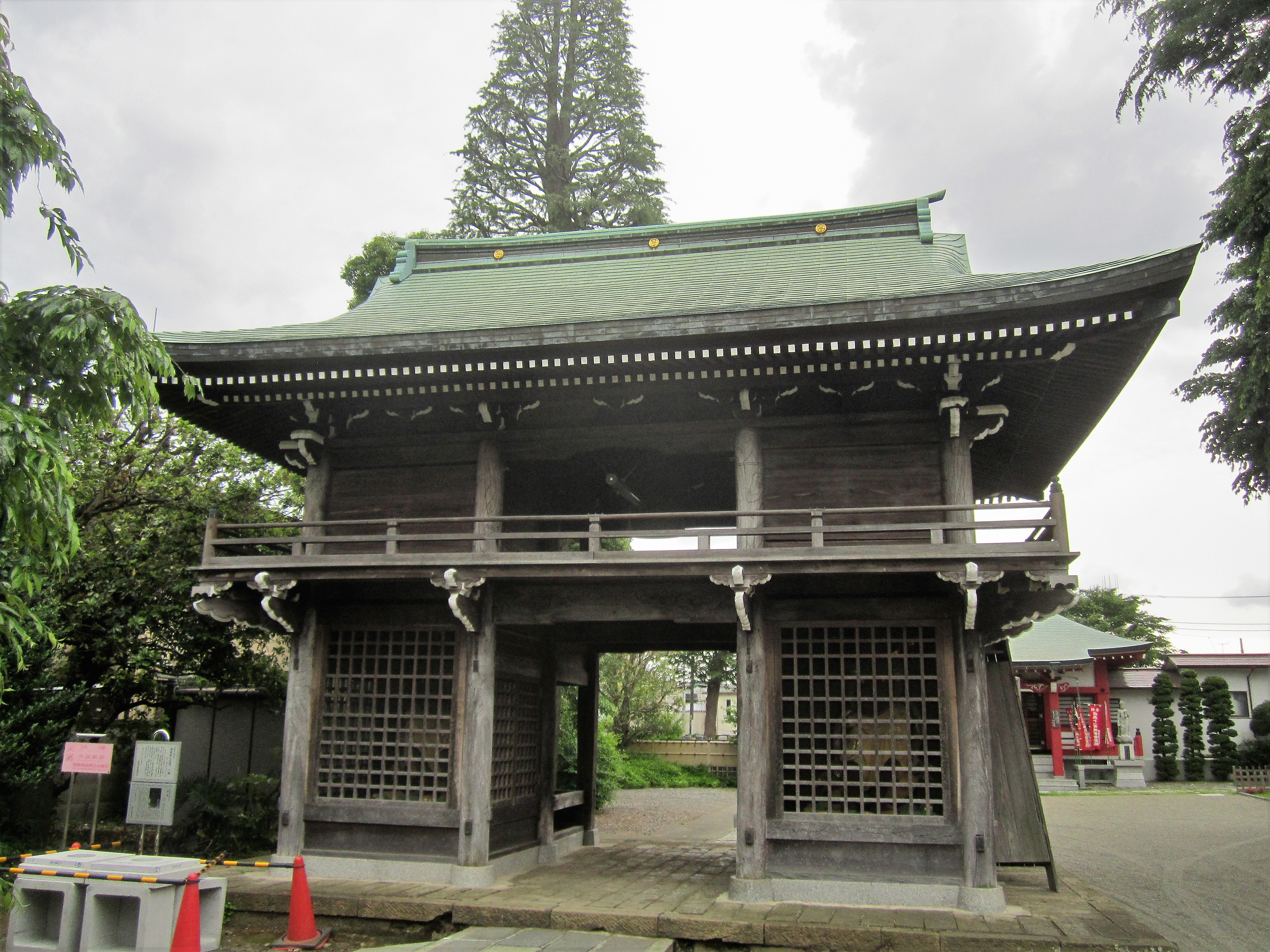 西光寺（調布市上石原）仁王門 Canon PowerShot A2200